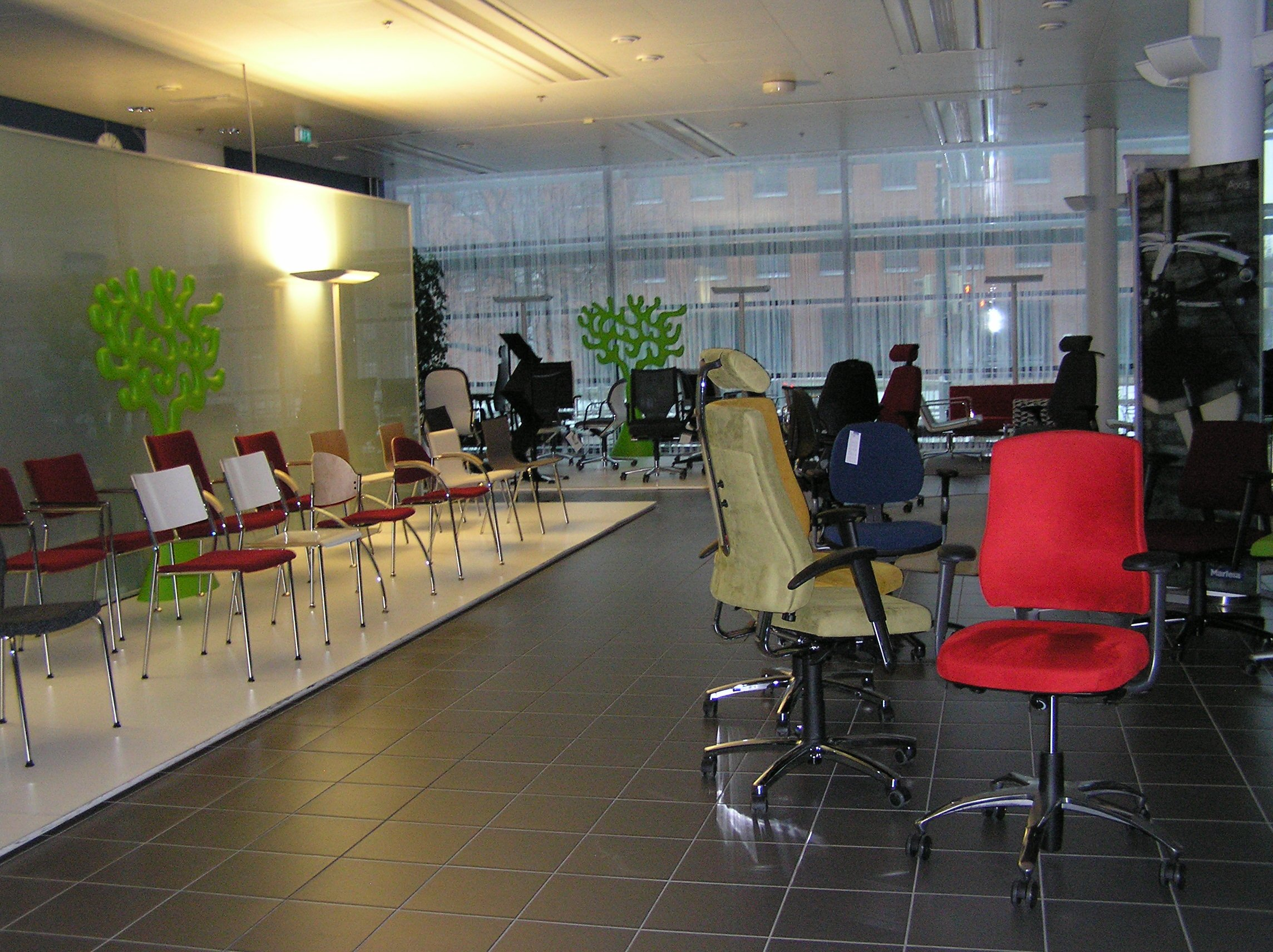 Martela mööbel Martela peakontoris